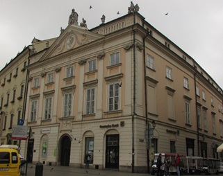 будинок